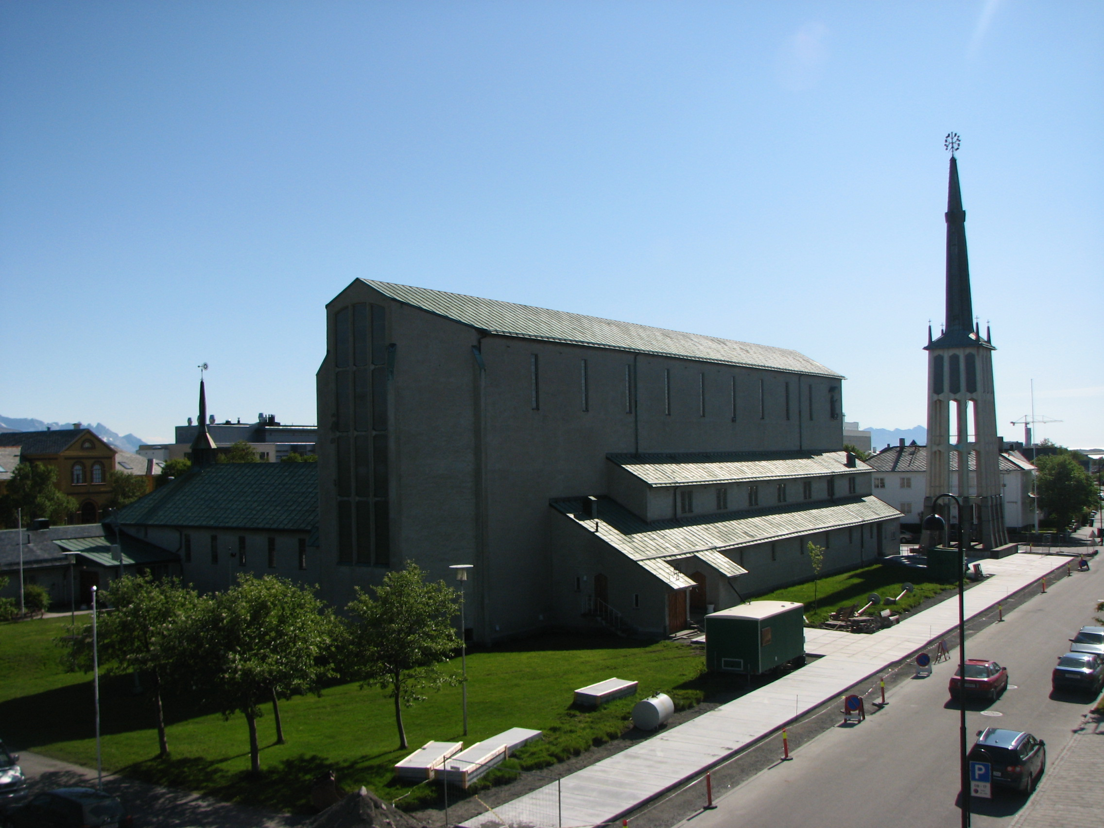 Bodø domkirke fra NØ